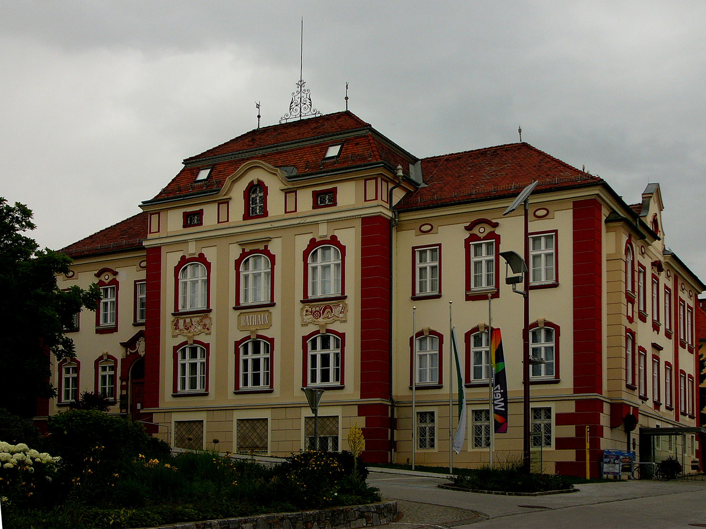 Das Rathaus von Weiz.